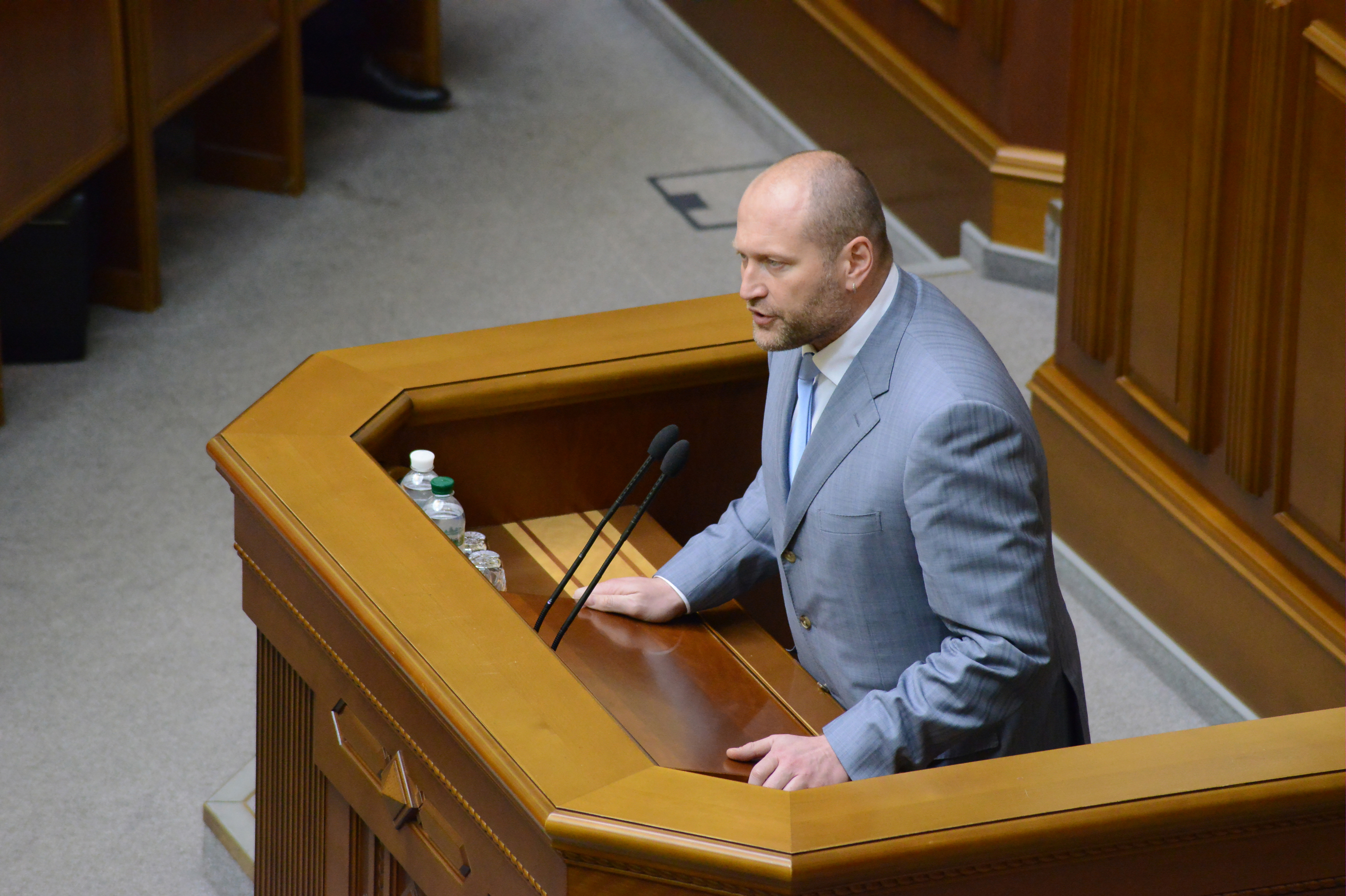 ВЕРХОВНА РАДА УКРАЇНИ 2015 фотограф Вадим Чуприна